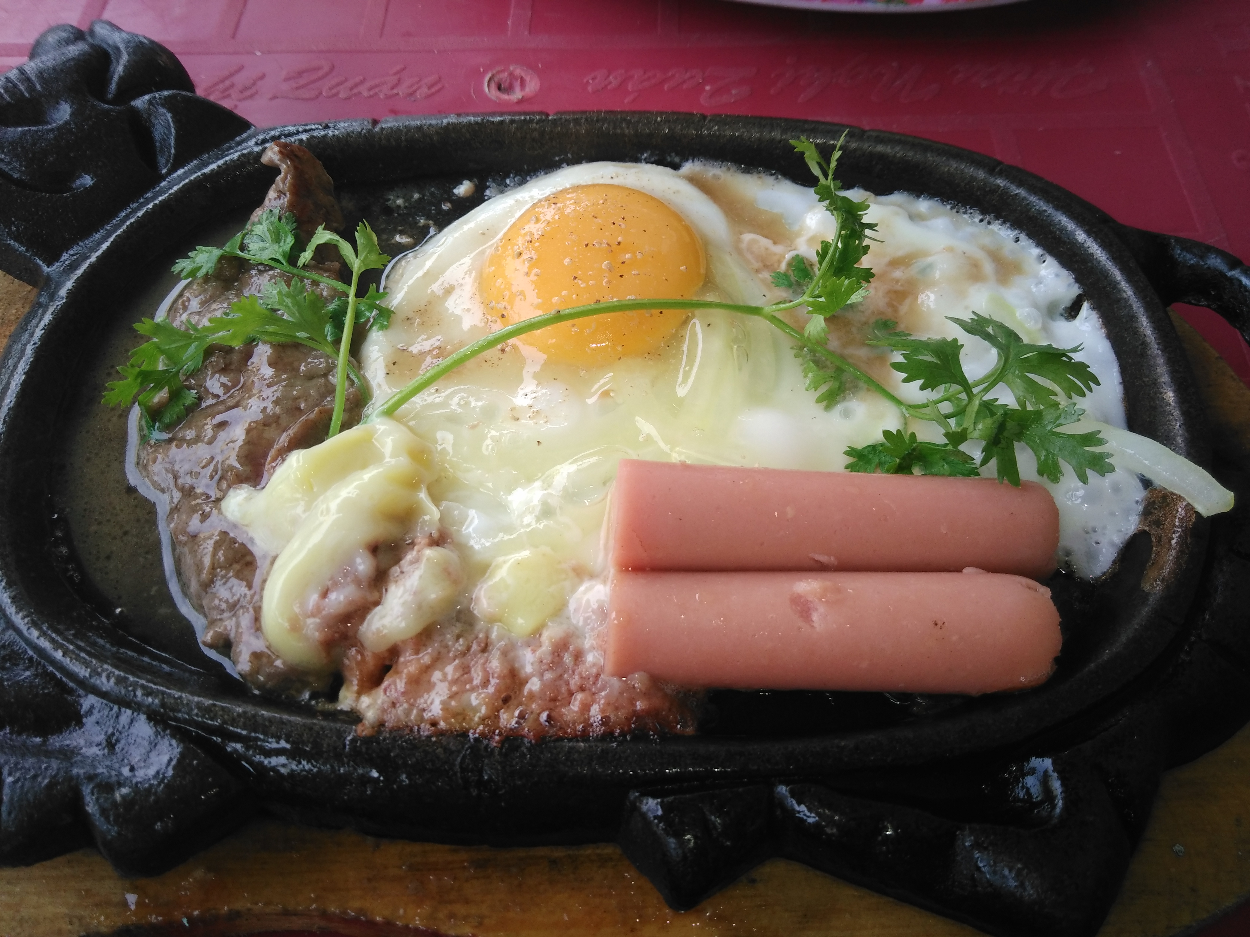 Bò bít tết kiểu Việt Nam (có xúc xích) ở Bình Hưng Hòa A